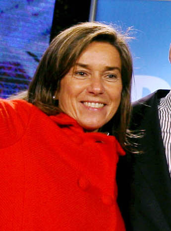 iniciocampaña_07